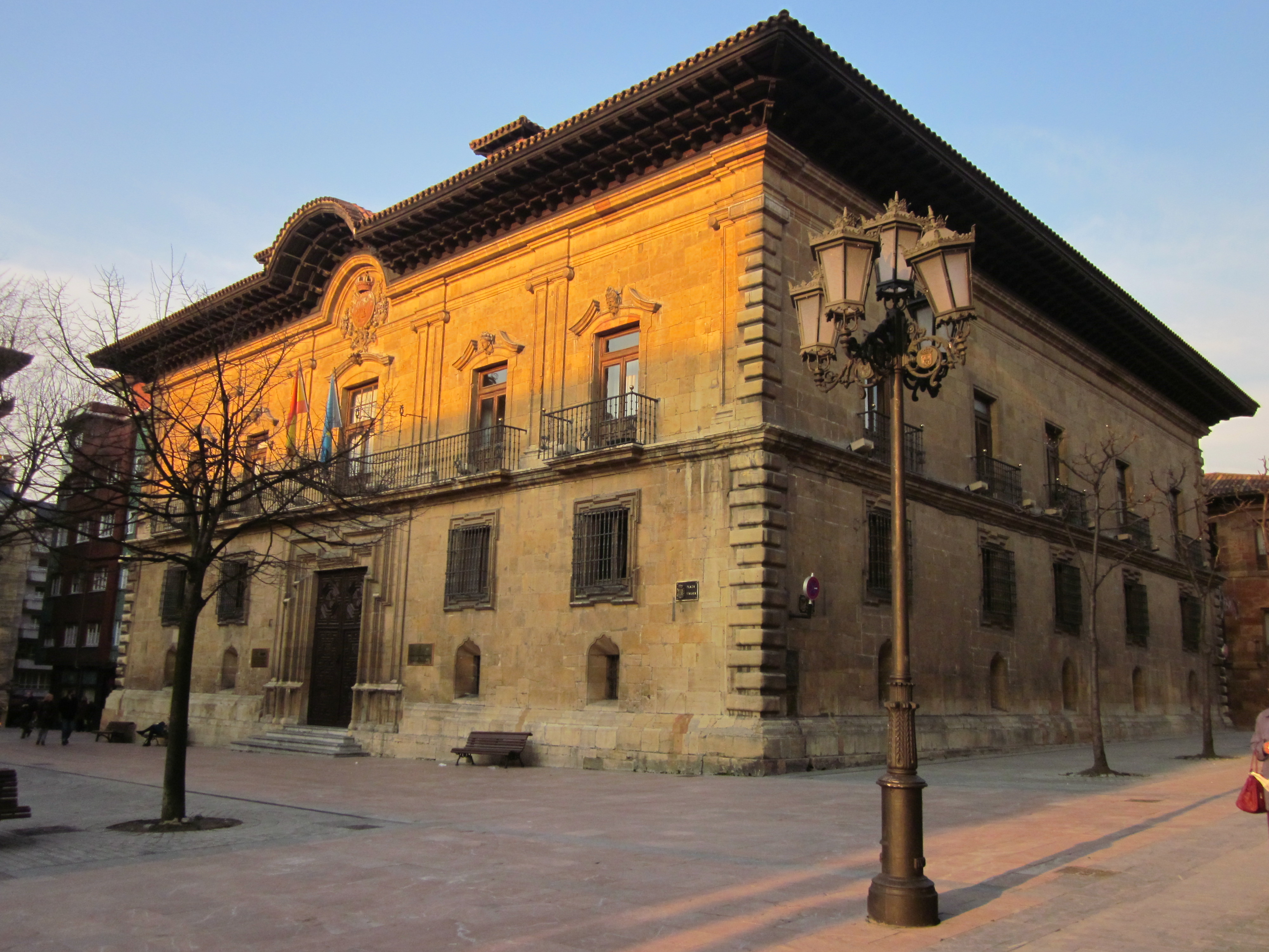 Palacio de Camposagrado. Oviedo. Principado de Asturias. España.